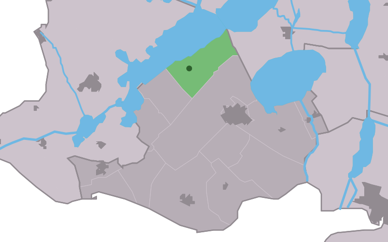 Kaartsje fan himrik fan Ealahuzen